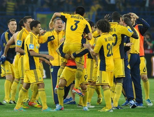 ФК Металіст святкує здобуття срібних нагород чемпіонату України сезону 2012-13